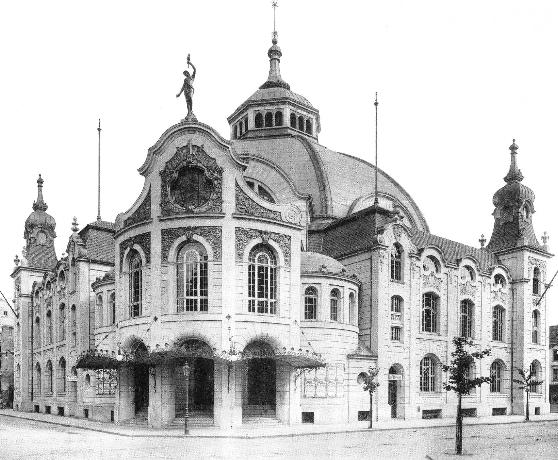 Apollo-Theater in Düsseldorf, erbaut 1898–1899 von Architekt Hermann vom Endt, mehrfach umgebaut (u. a. zum Kino), 1966 abgebrochen